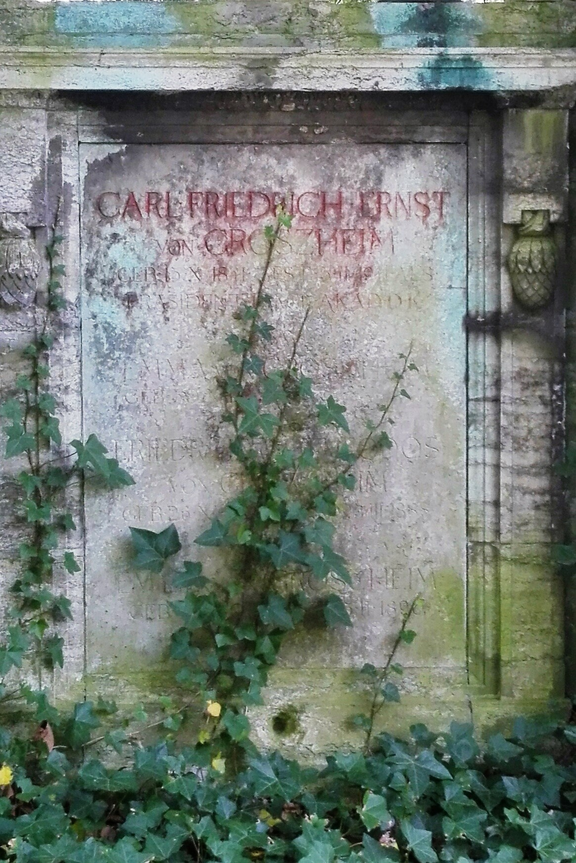 Detailaufnahme der Tafel